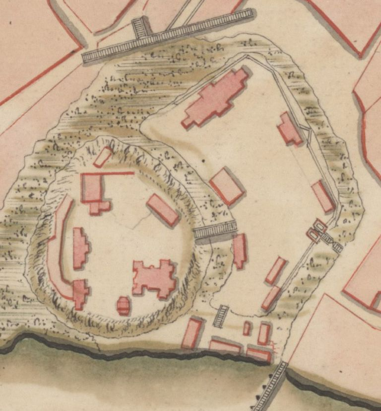 Old_Castle_Slucak_(Bielarus), Комплекс Верхняга і Ніжняга замкаў у Слуцку